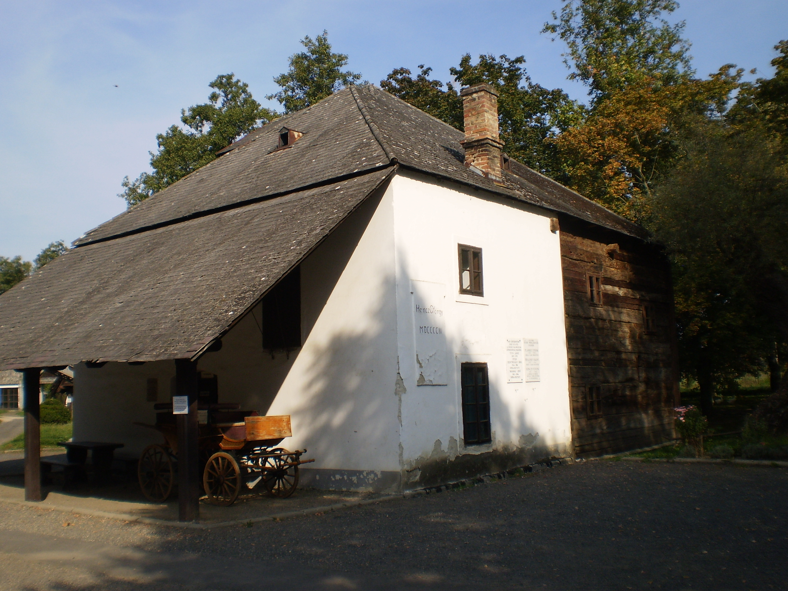 Hencz-vízimalom a zalaegerszegi Göcseji Falumúzeumban